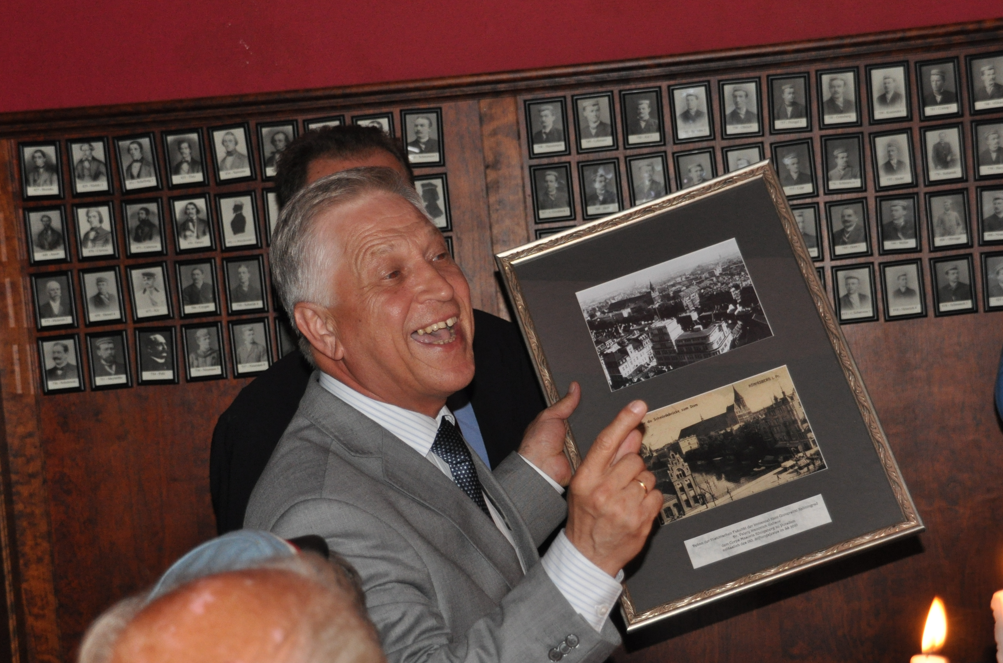 Prof. Valéry Ivanovič Galtsov (Dekan der Historischen Fakultät der Immanuel-Kant-Universität in Kaliningrad) während eines Vortrags am 18. Juni 2010 in Potsdam